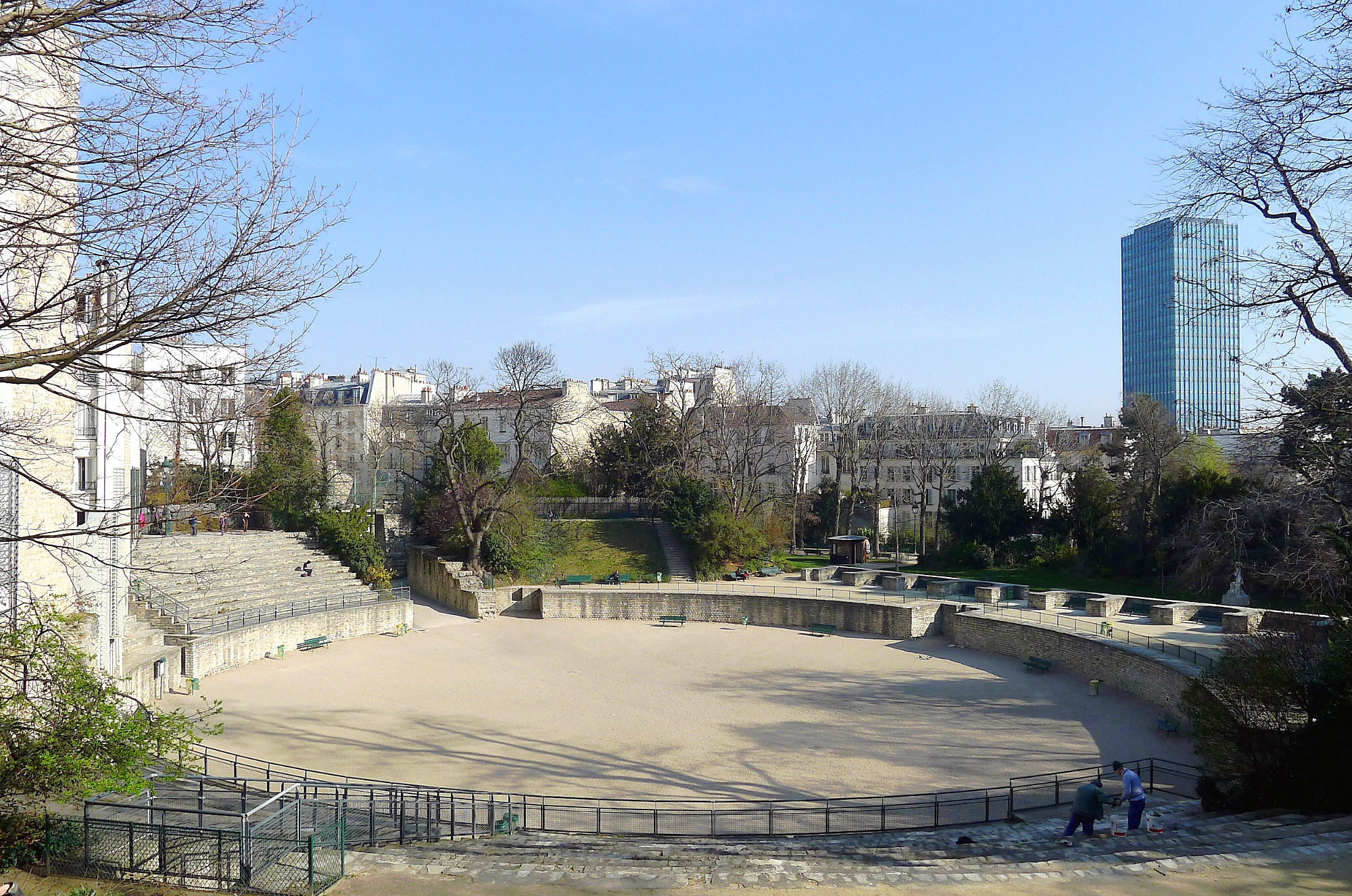 Arènes de Lutèce (en arrière-plan, la tour Jussieu) - Paris V .